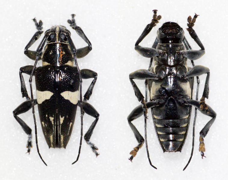 Gestro,1876 Sex: Male Data: 17-06-11 - Yapen Island - Near Serui - West Papua - Indonesia Size: ?